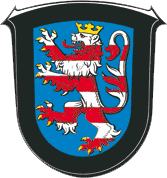 Wappen von Allendorf (Lumda)